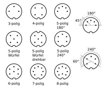 Verschiedene DIN-Stecktypen graphisch.